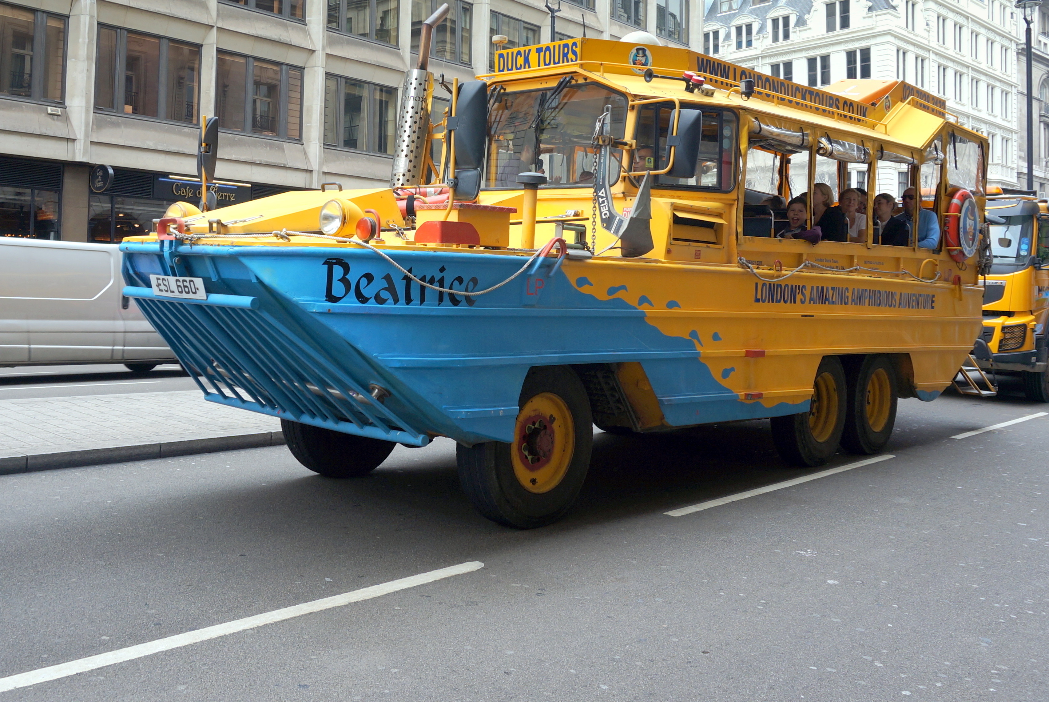 Amfibia GMC DUKW 353 współcześnie wykorzystywana do obwożenia turystów po centrum Londynu, z przepłynięciem Tamizy w programie.